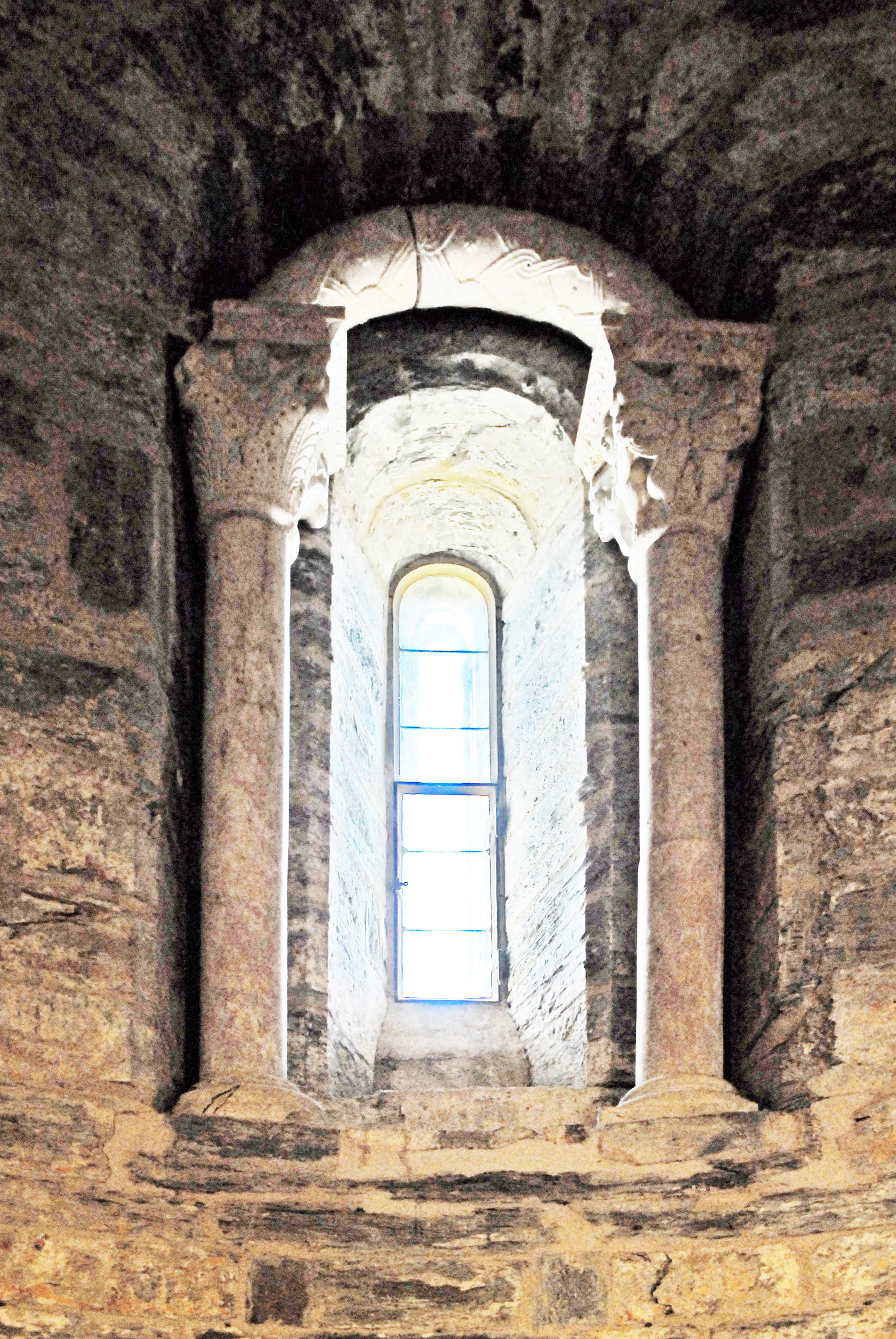 Serrabone, Chorapsis, Fenster